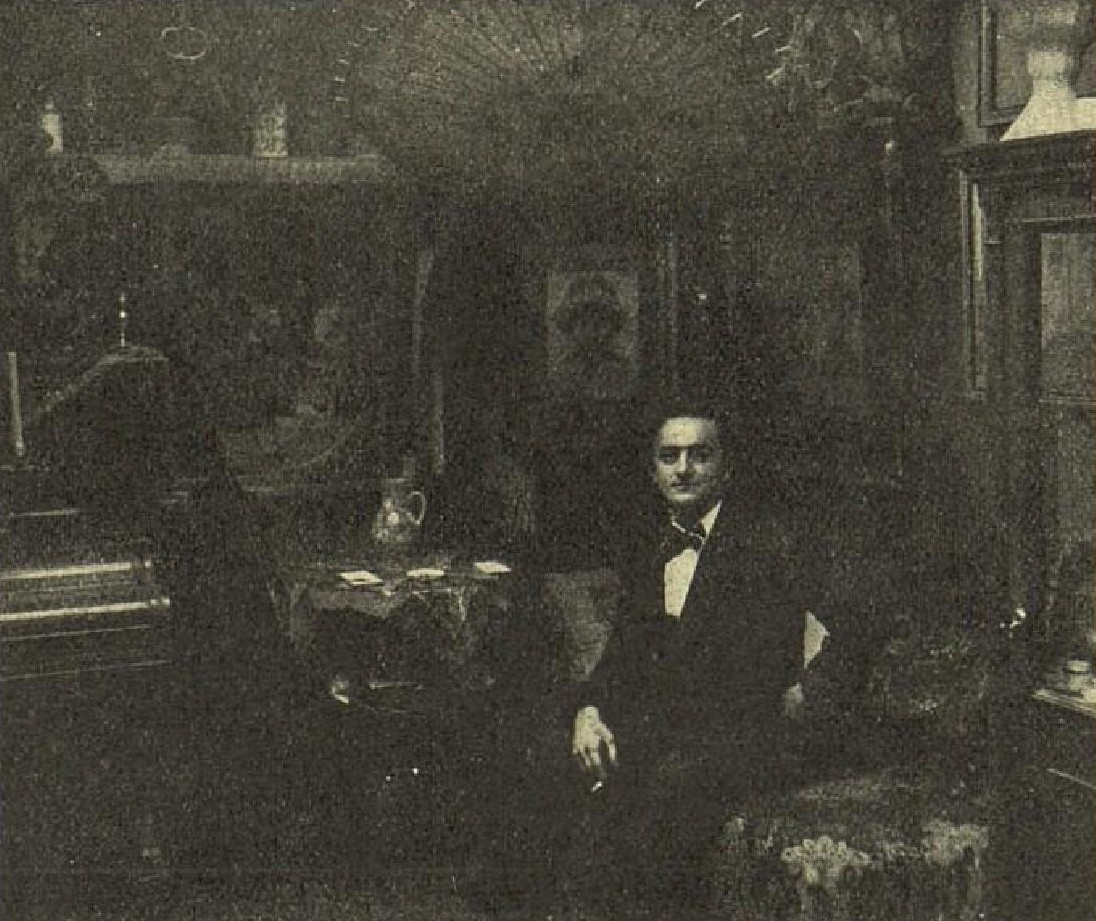 Jan Čejka (1888-1934), český akademický malíř